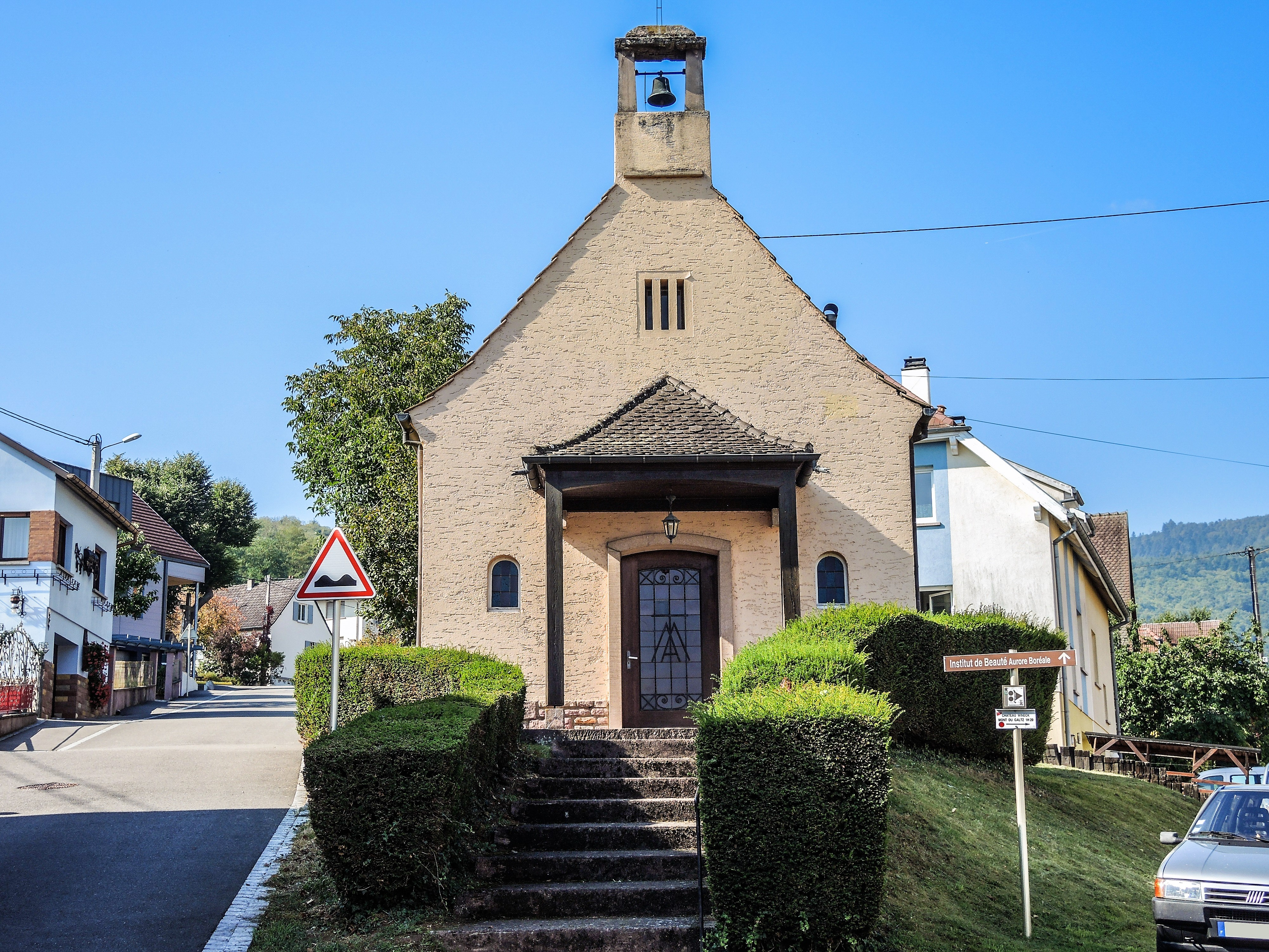 Chapelle Notre-Dame-des-Douleurs. Katzenthal; Haut-Rhin.